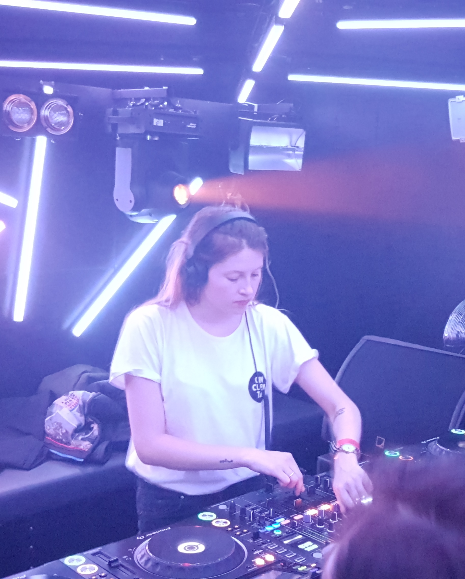 At work in Toffler - Rotterdam